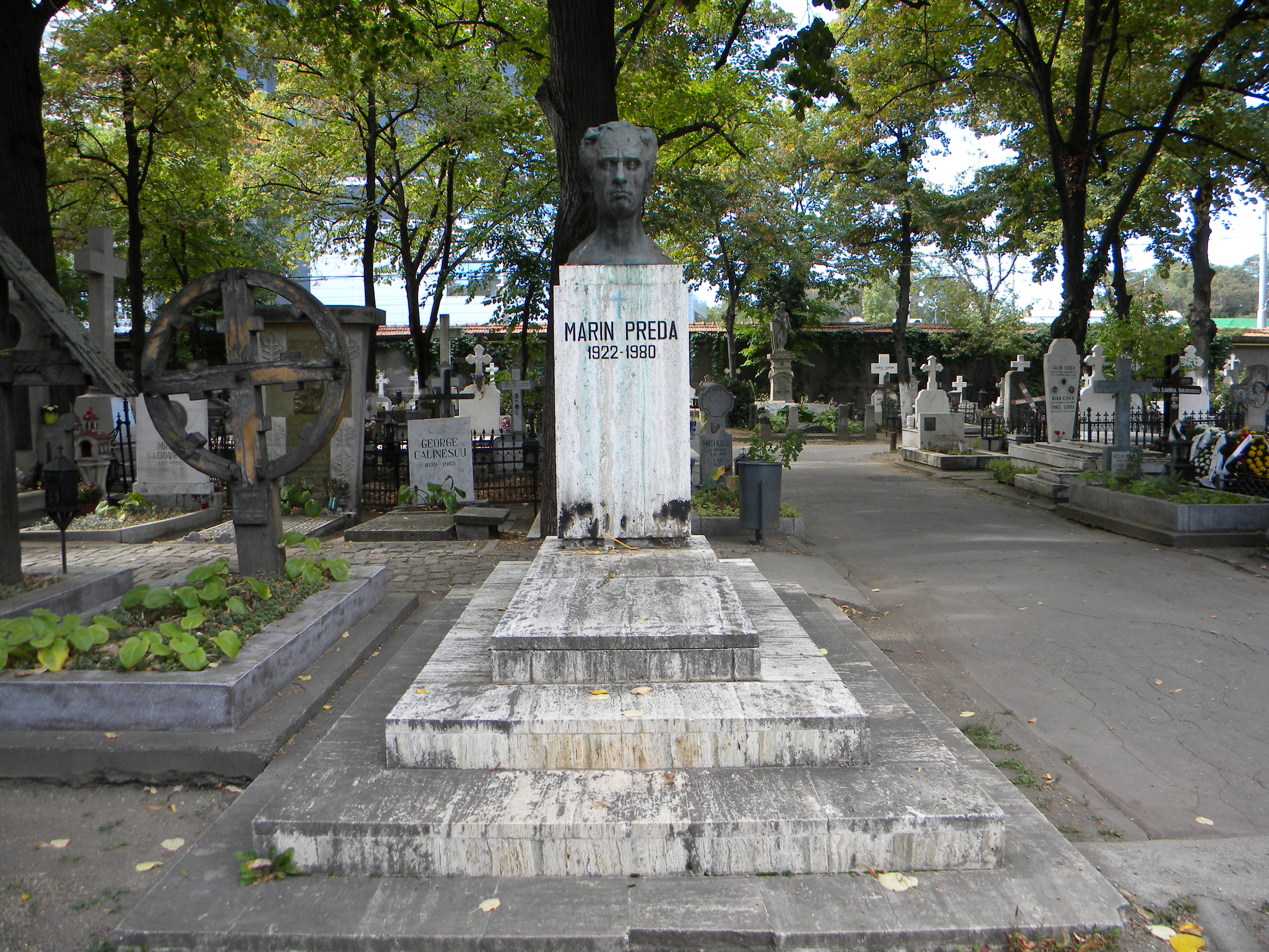 Bucuresti, Romania, Cimitirul Bellu Ortodox (Mormantul lui Marin Preda) 128